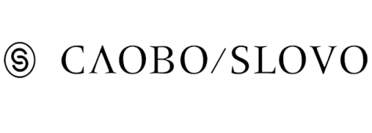 логотип издателства